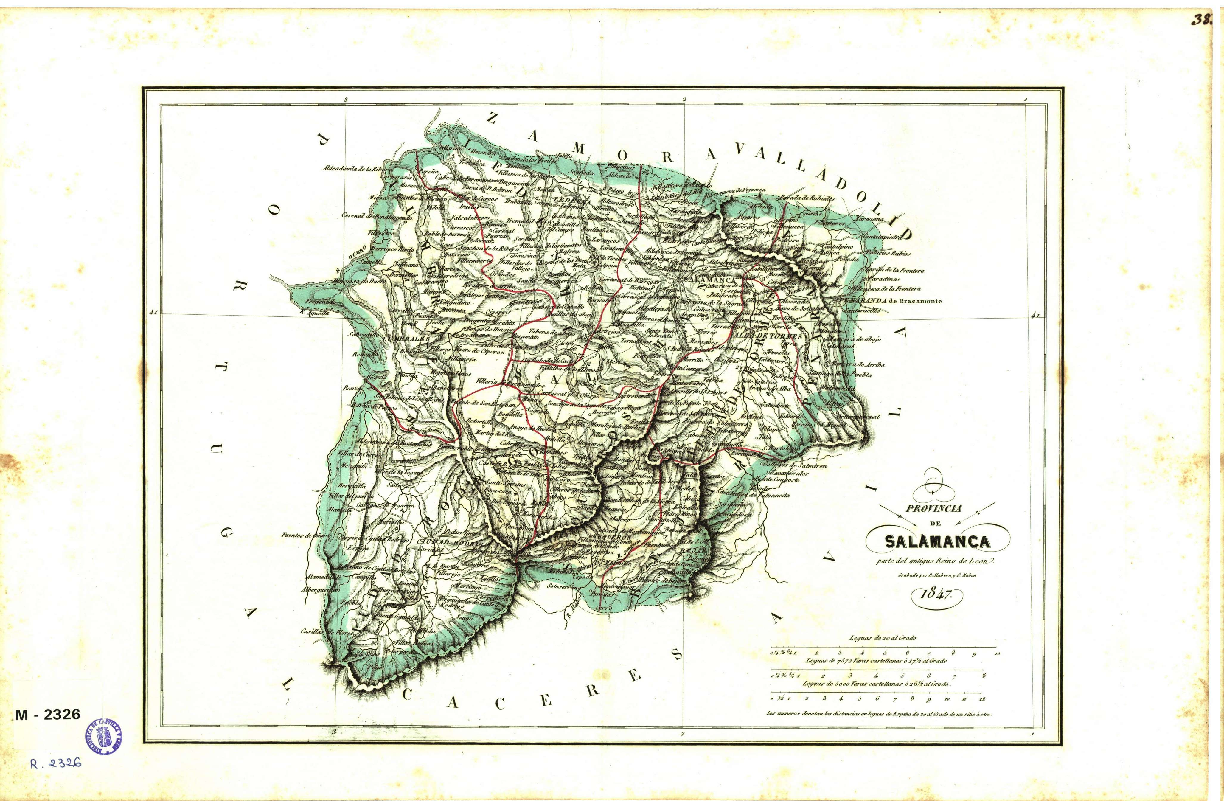 Mapa "Provincia de Salamanca, parte del antiguo Reino de León". Grabado por R. Alabern y E. Mabon